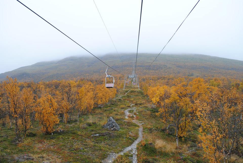 Linbana till Njullas topp